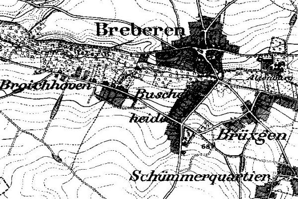 Neuaufnahme 1891-1912